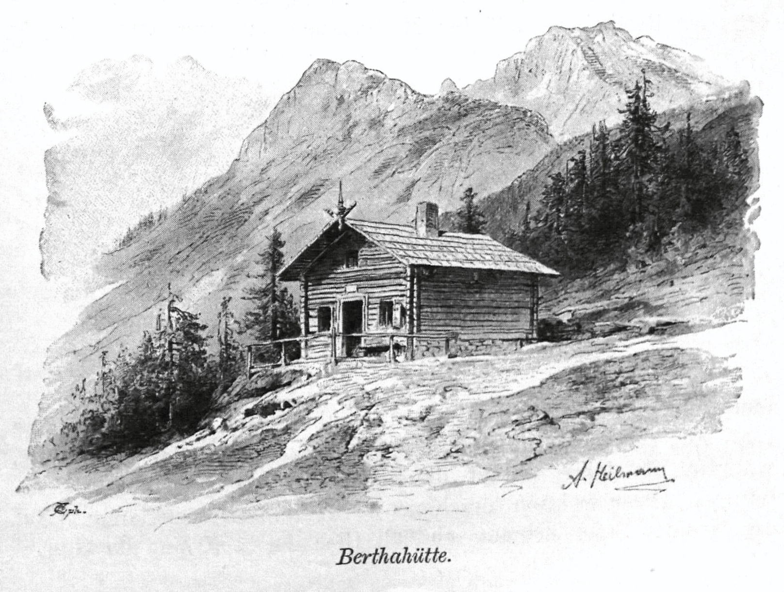 Berthahütte aus Zeitschrift des Deutschen und Oesterreichischen Alpenvereins 1894 Band 25